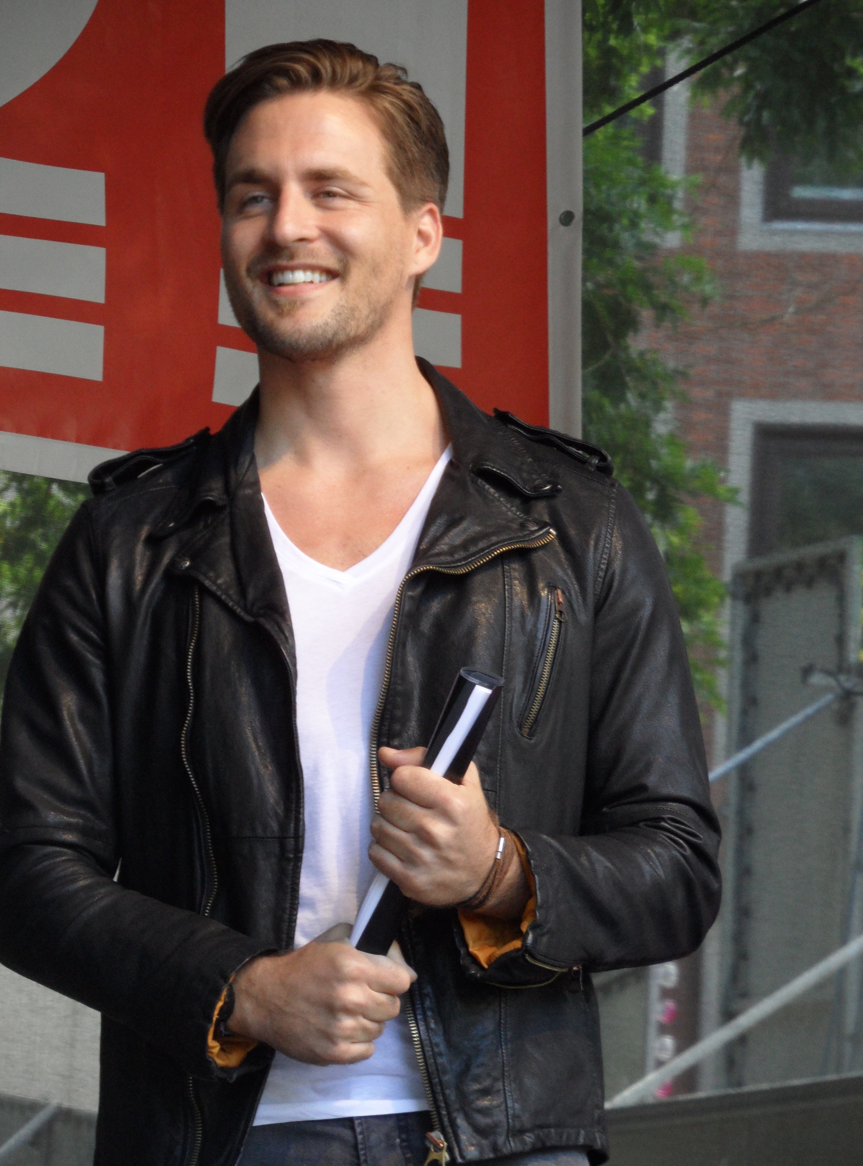 Alexander Klaws beim Stage Academy-Casting in Oldenburg